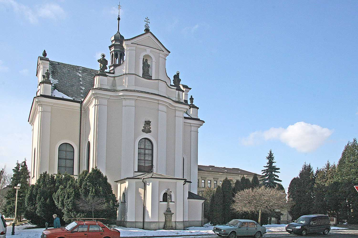 Česky: Choceň, kostel svatého Františka Serafínského, z ulice Záměstí. - OpenStreetMap(Info)